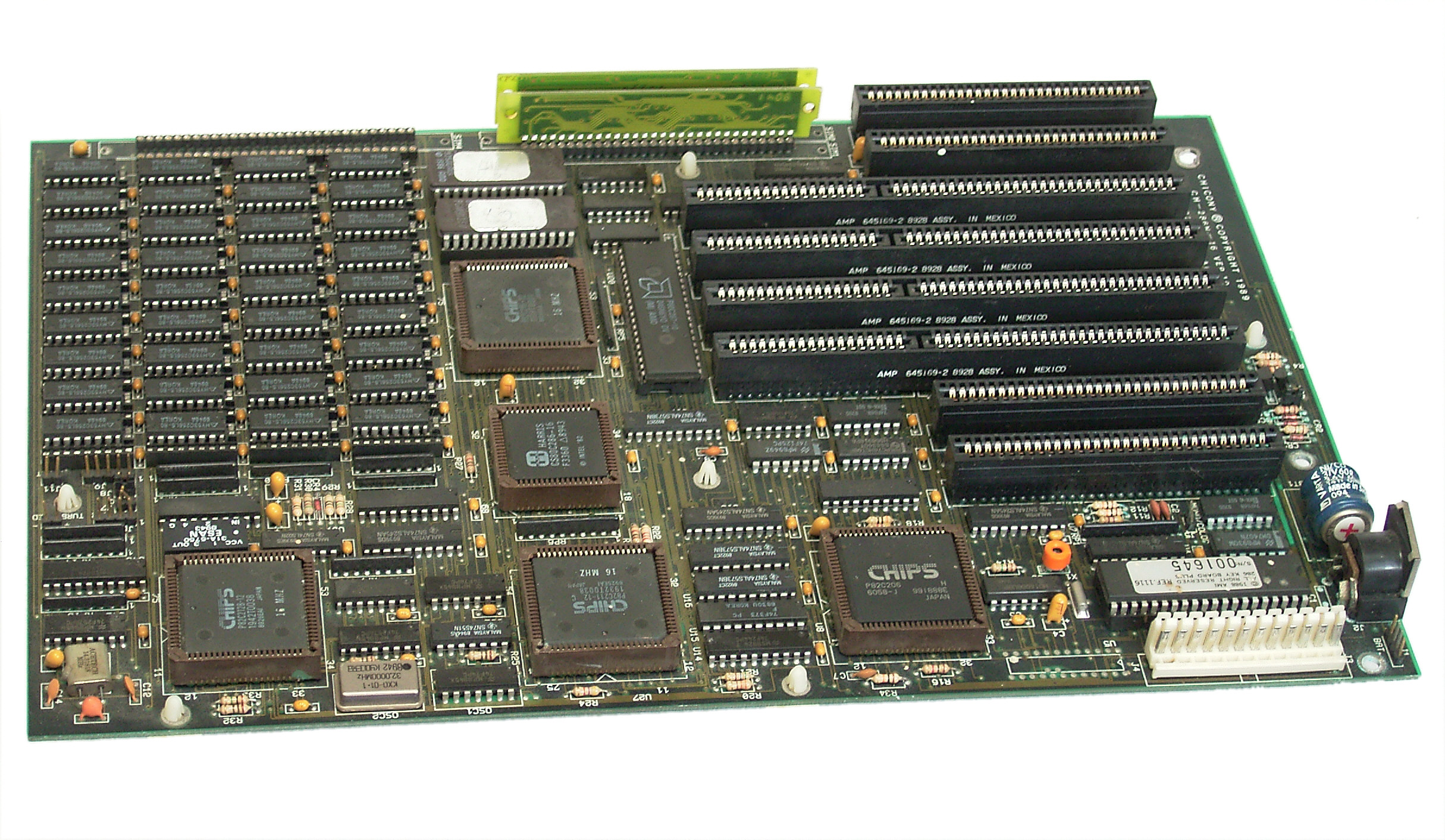 Chicony CH-286N-16 Ver 1.0, ein typisches PC-Mainboard im AT-Format für den Intel 80286 mit C&T NEAT-Chipsatz, hier mit Harris 80C286-16 CPU und AMD 80C287-10 Koprozessor.